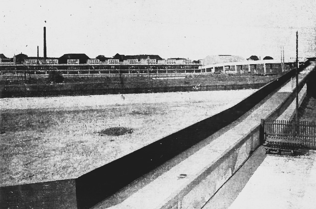 Hochtrift vom Hafen zum Seegrenzschlachthaus.